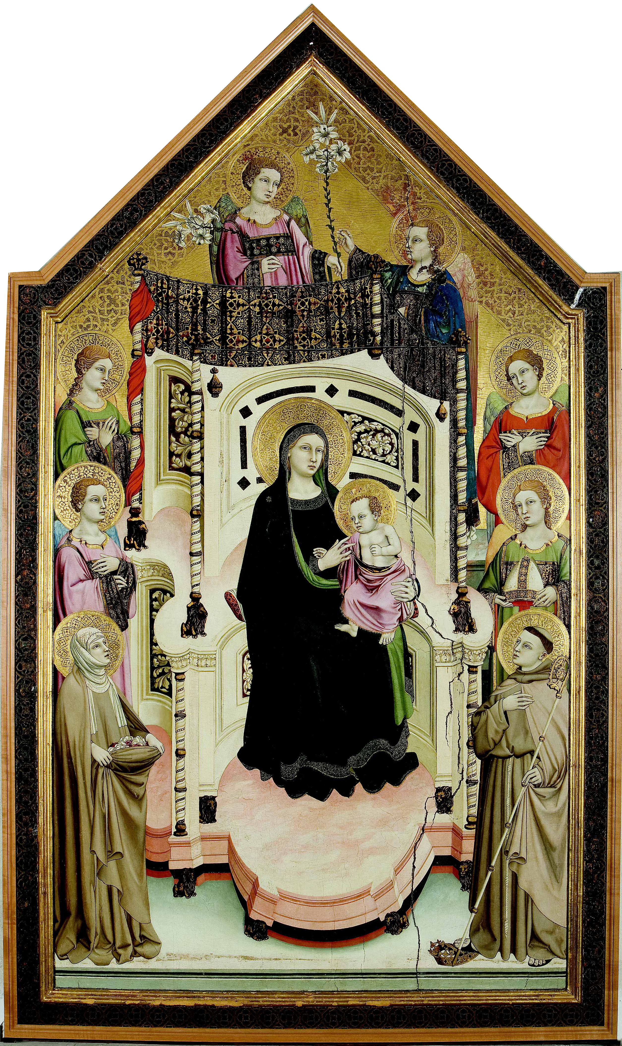 Maestro di figline, Madonna in trono col Bambino fra San Ludovico di Tolosa e Sant'Elisabetta di Ungheria